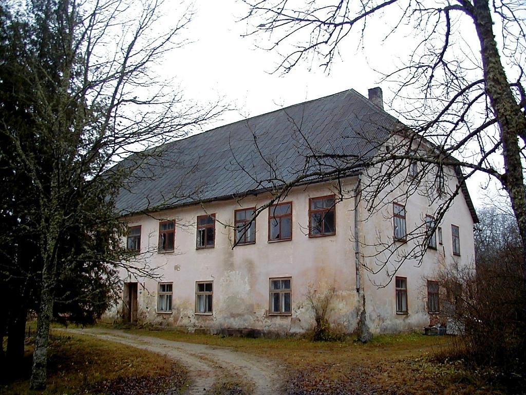 Sauļu muižas kungu māja 2000-11-11